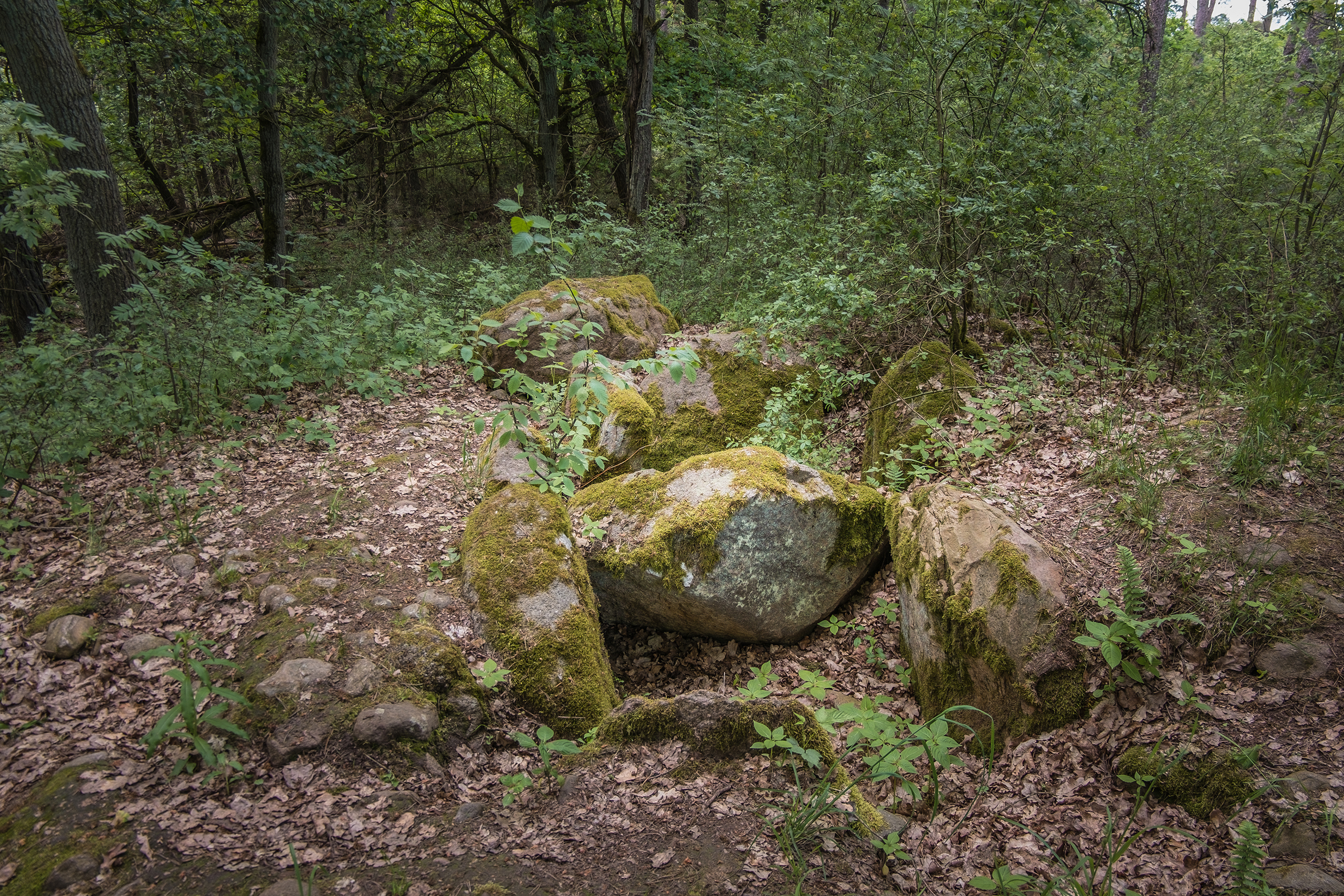 Erweiterter Dolmen der neolithischen Trichterbecherkultur bei Freidorf in Mecklenburg-Vorpommern